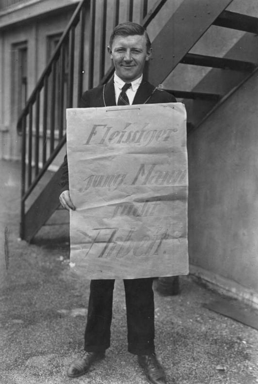 Arbeitsloser auf Arbeitssuche Originelles Arbeitsgesuch eines Arbeitslosen. 1928 Zentralbild 19461-28 [Mann mit Schild "Fleissiger jung. Mann sucht Arbeit"] Information added by Wikimedia users. English translation of sign's text: "Diligent young man seeking work."